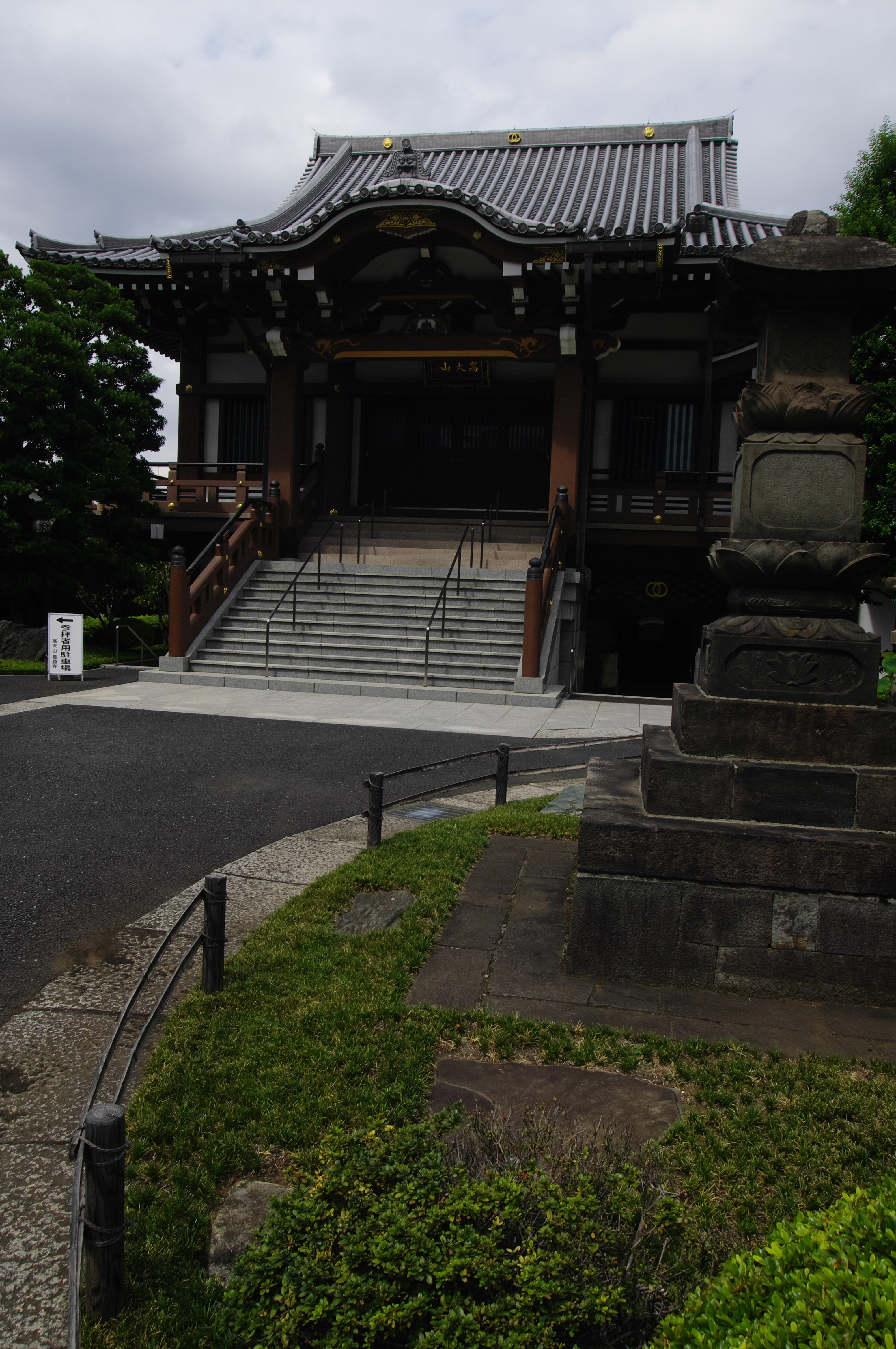 御府内八十八ヶ所 #24 最勝寺